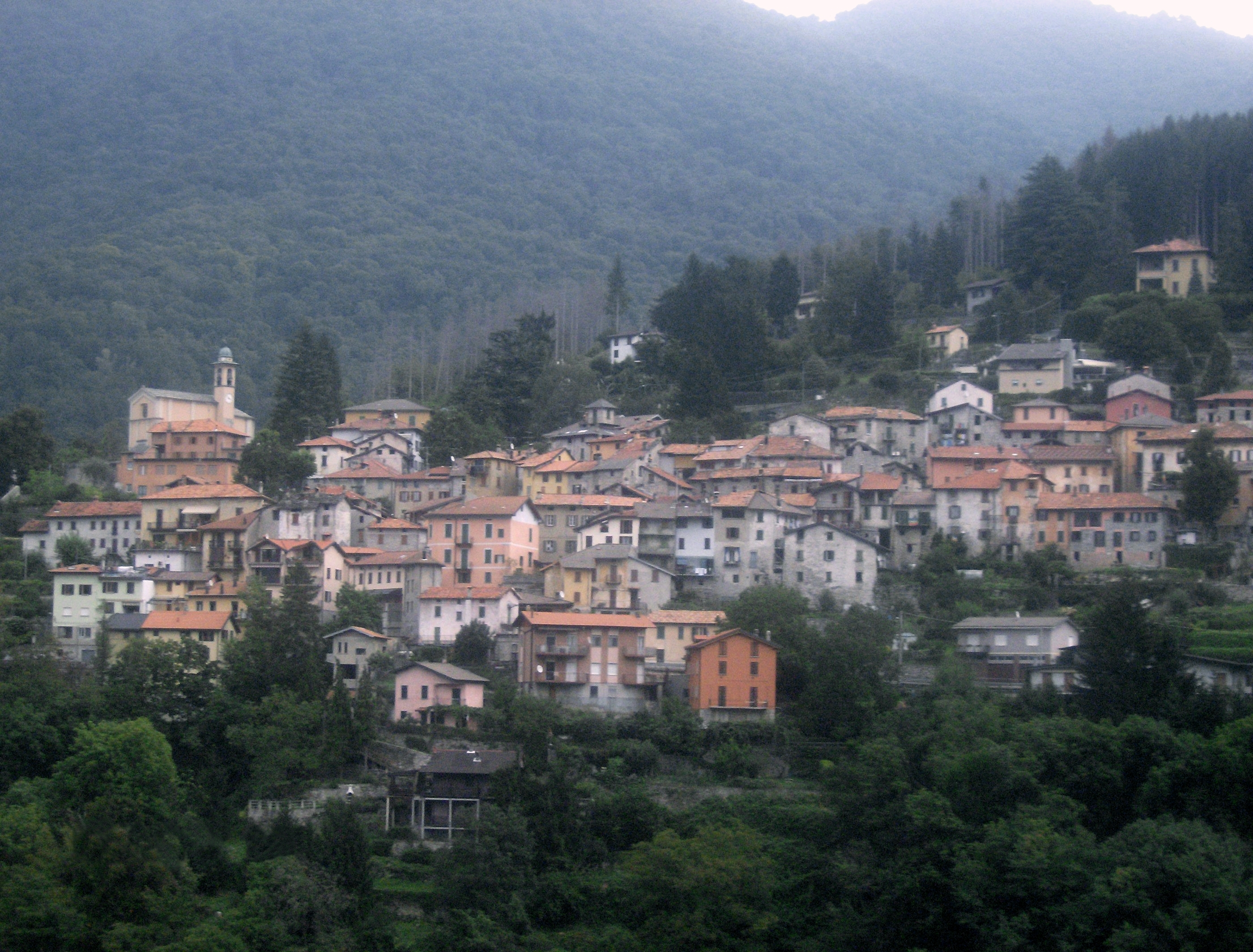 Vista del centro abitato di Lemna